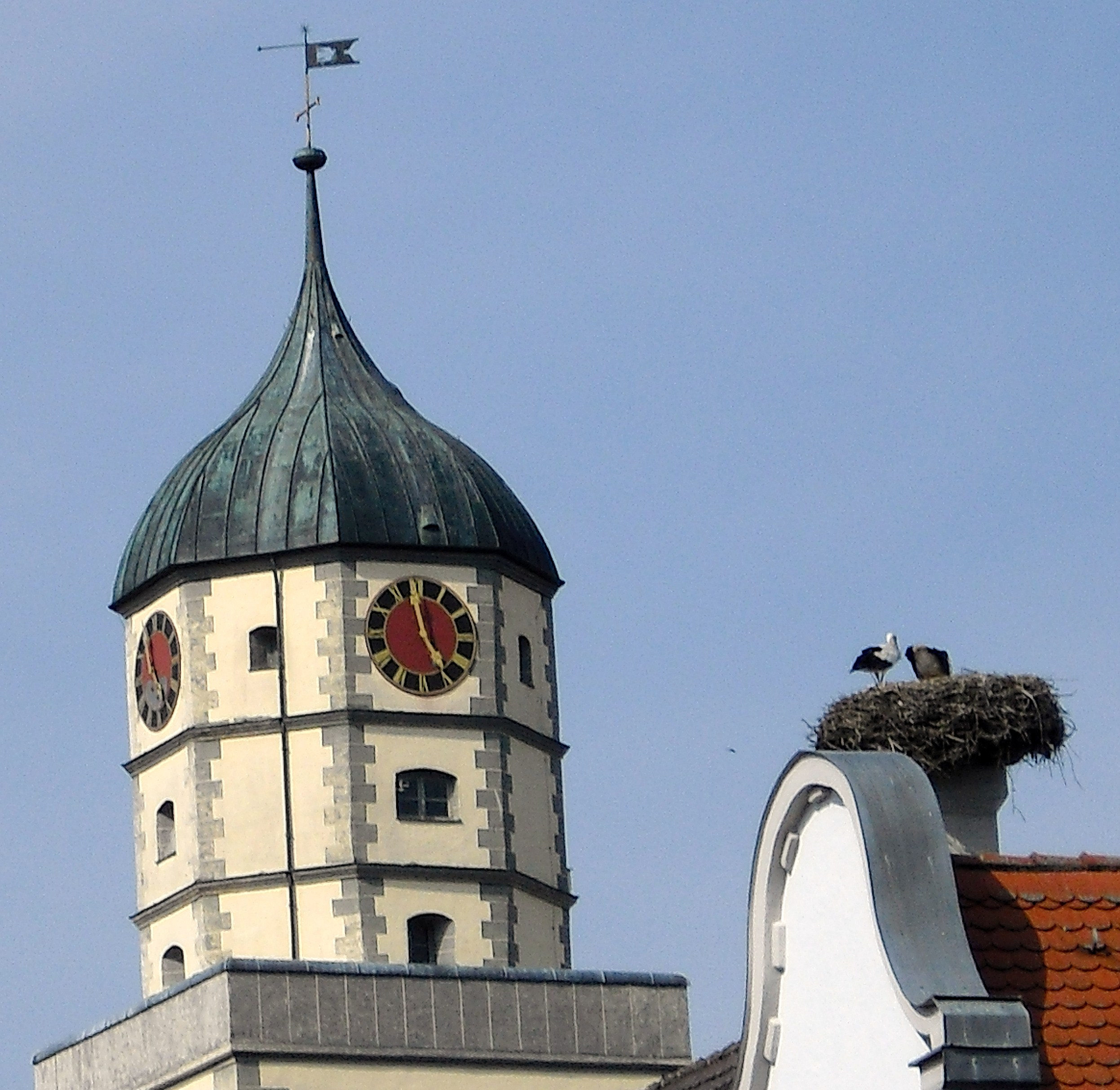 Kirchturm der evangelisch-lutherischen St. Jakobskirche Öttingen in Bayern - Storchennest